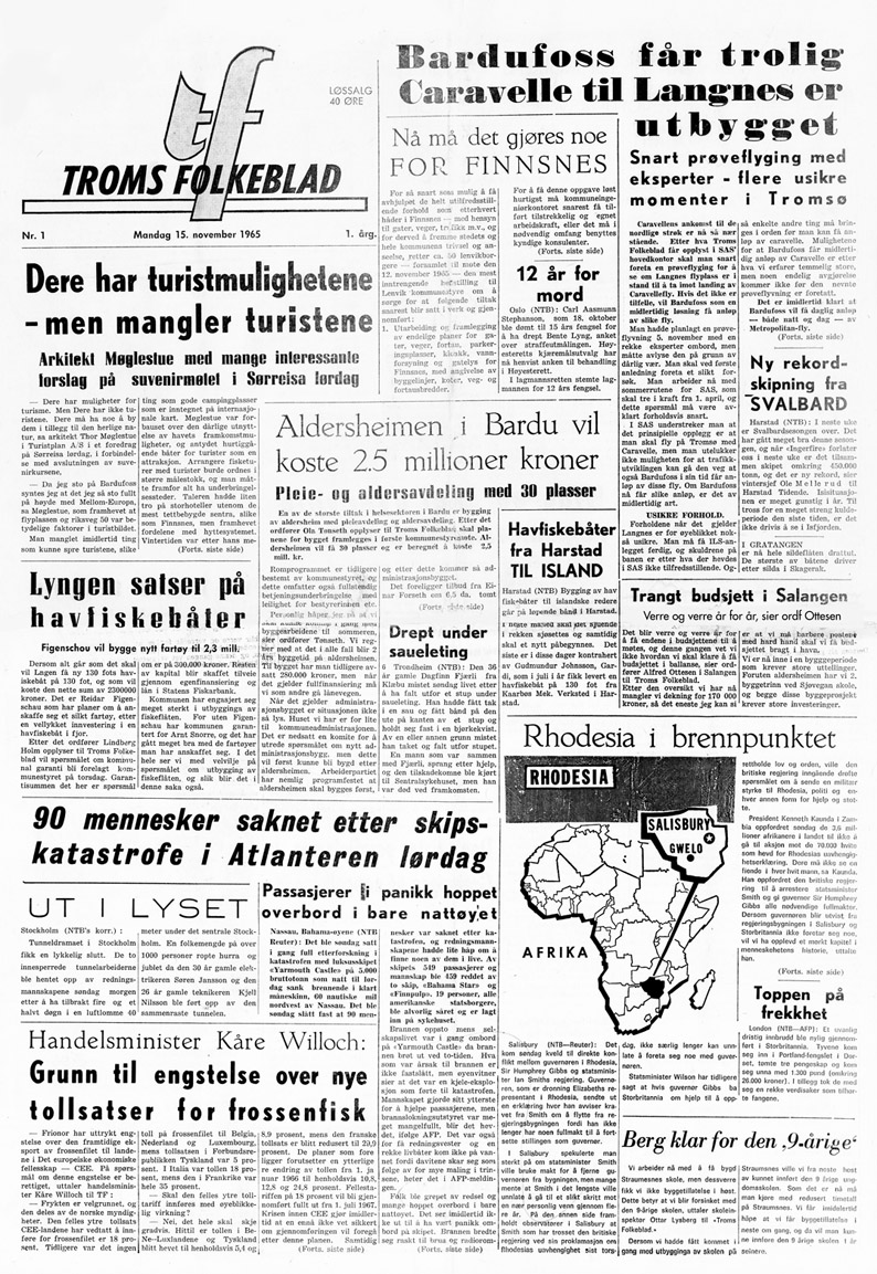 Første utgaven av Troms Folkeblad 15. november 1965